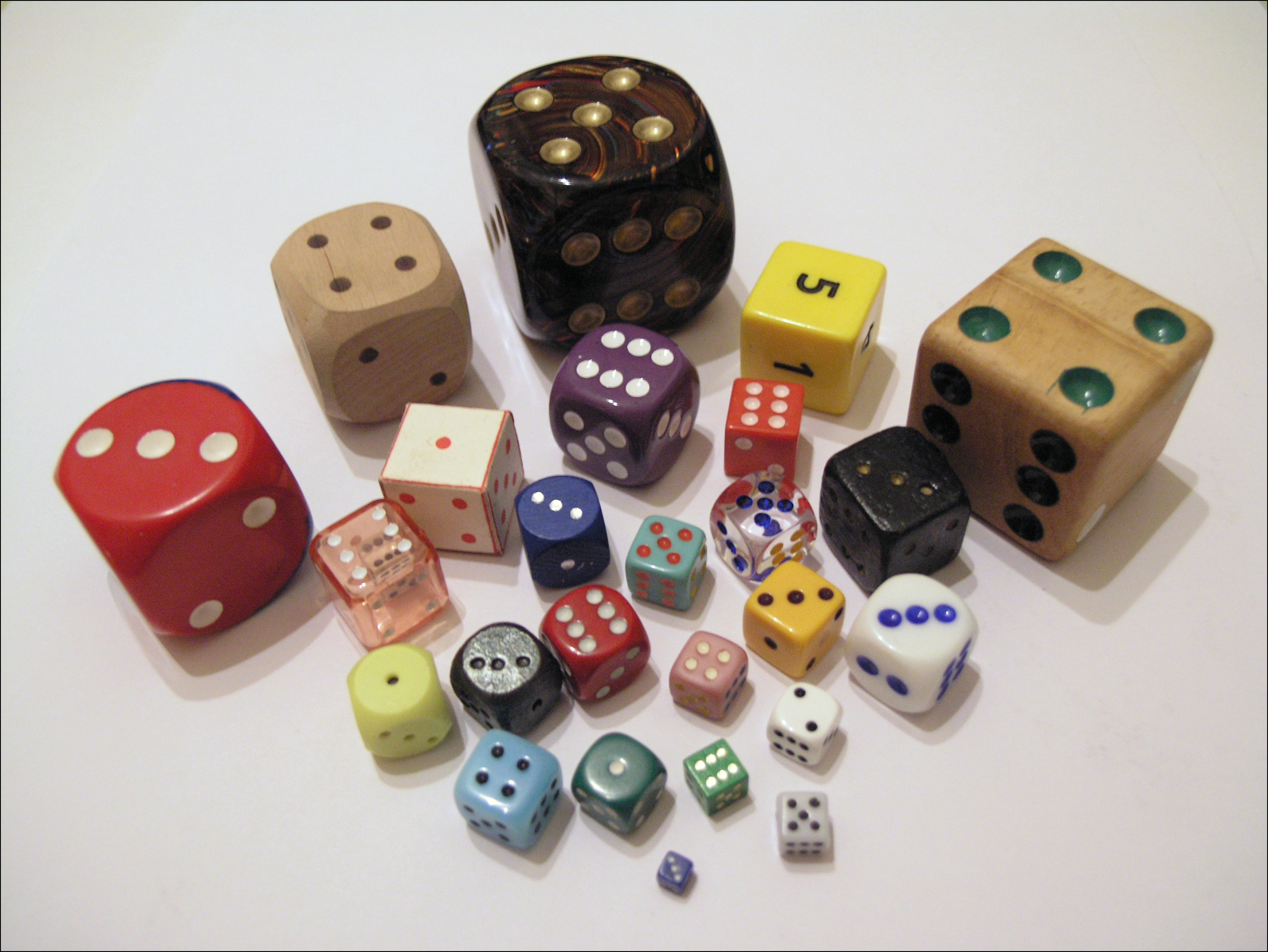 Hrací kostky